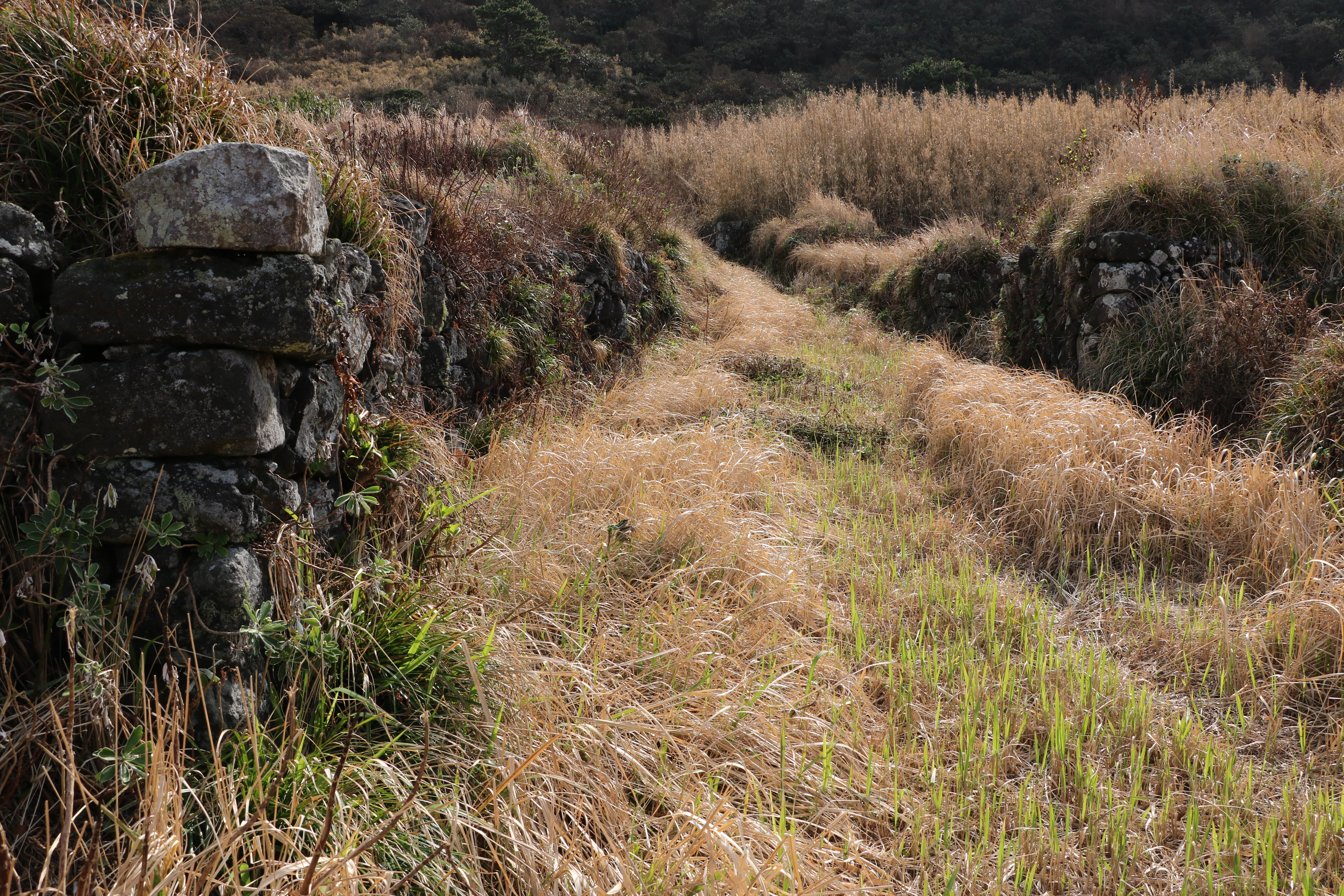 八丈小島鳥打地区（東京都八丈町）